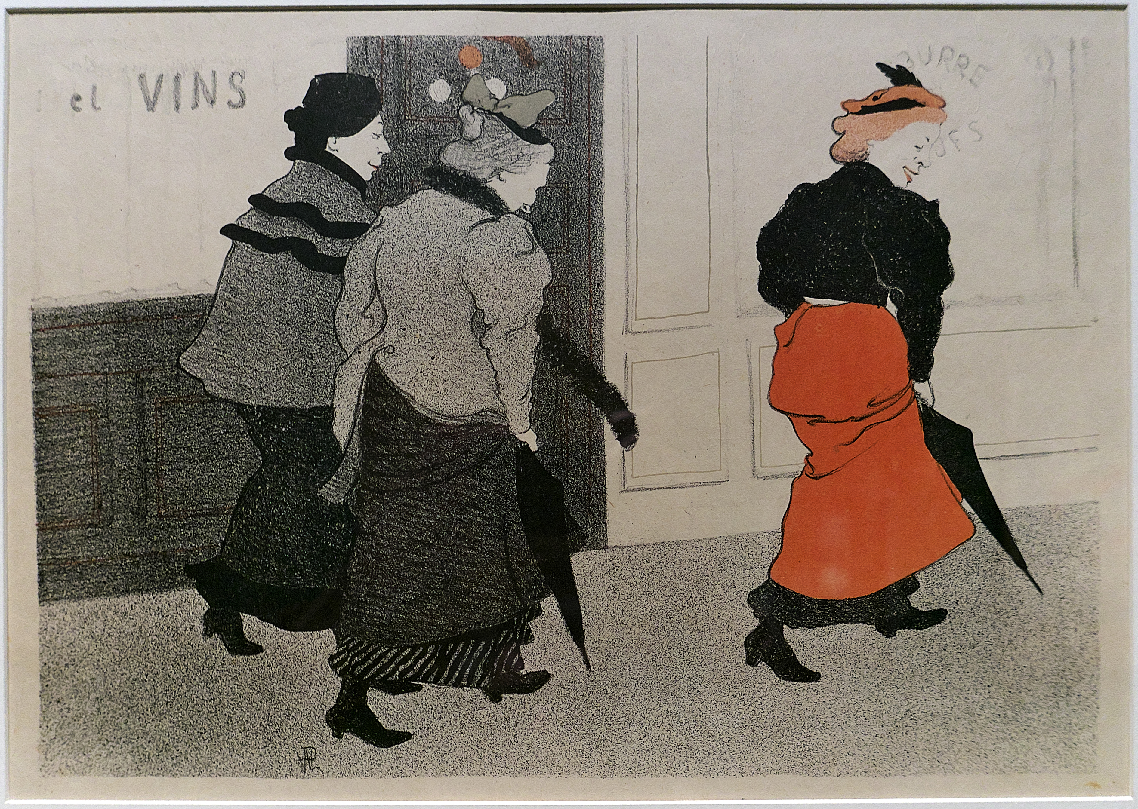 Litografía. Albúm VI de L'Estampe originale (1894)